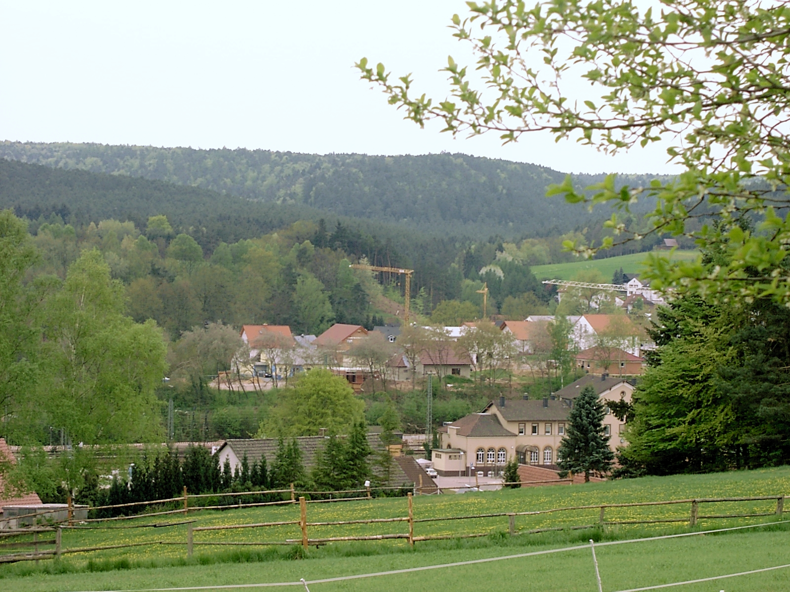 Hochspeyer_Teilansicht_mit_Bahnhof